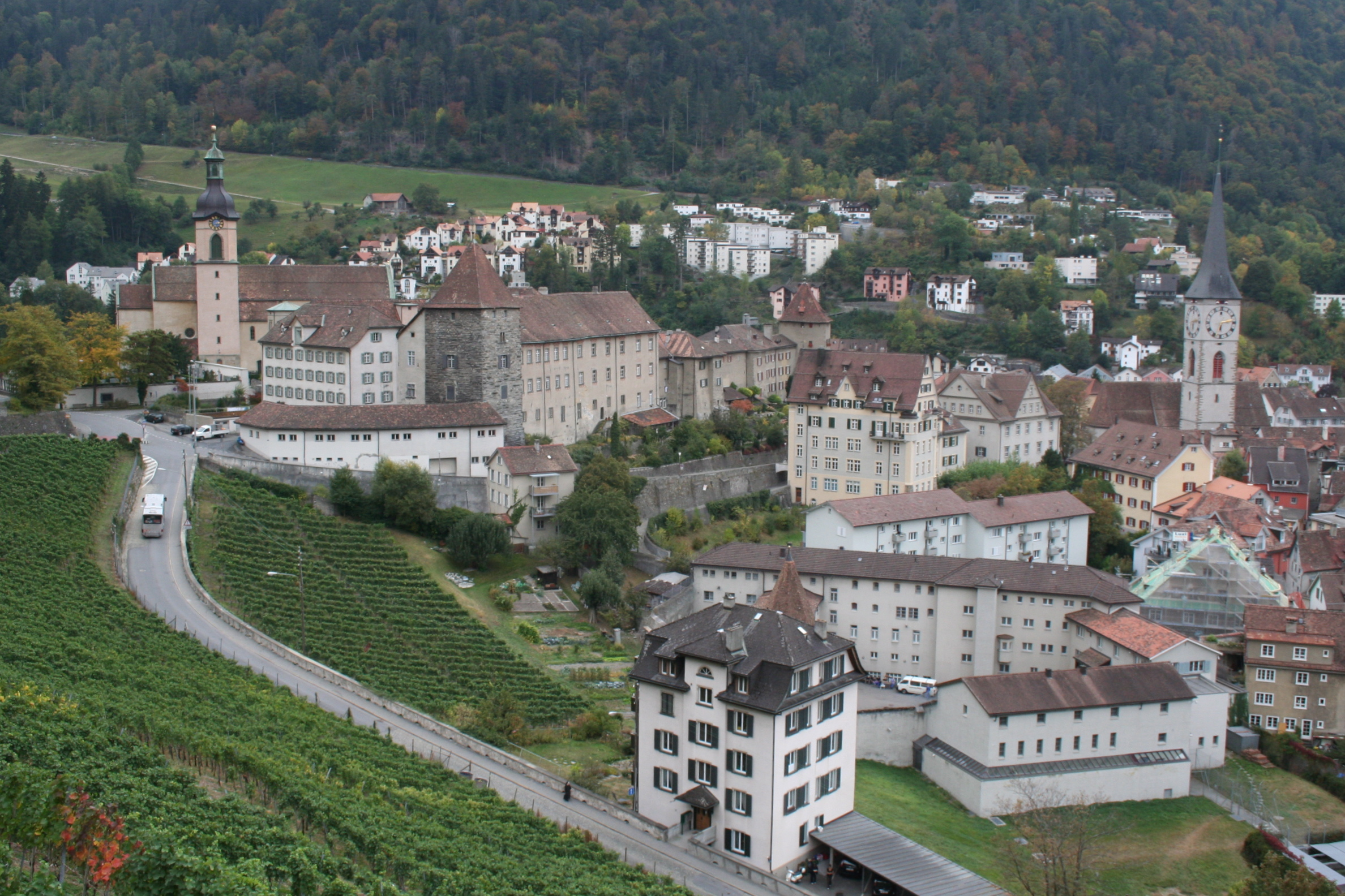 Blick auf das Hof-Quartier in Chur. Von links: Kathedrale, Bischöfliches Schloss, Martinskirche